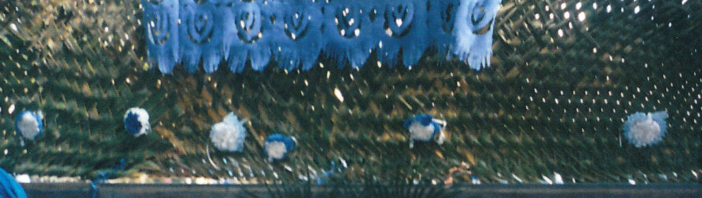 Le tressage des feuilles prend du temps mais il faut savoir que tout la salle verte est faîte ainsi.